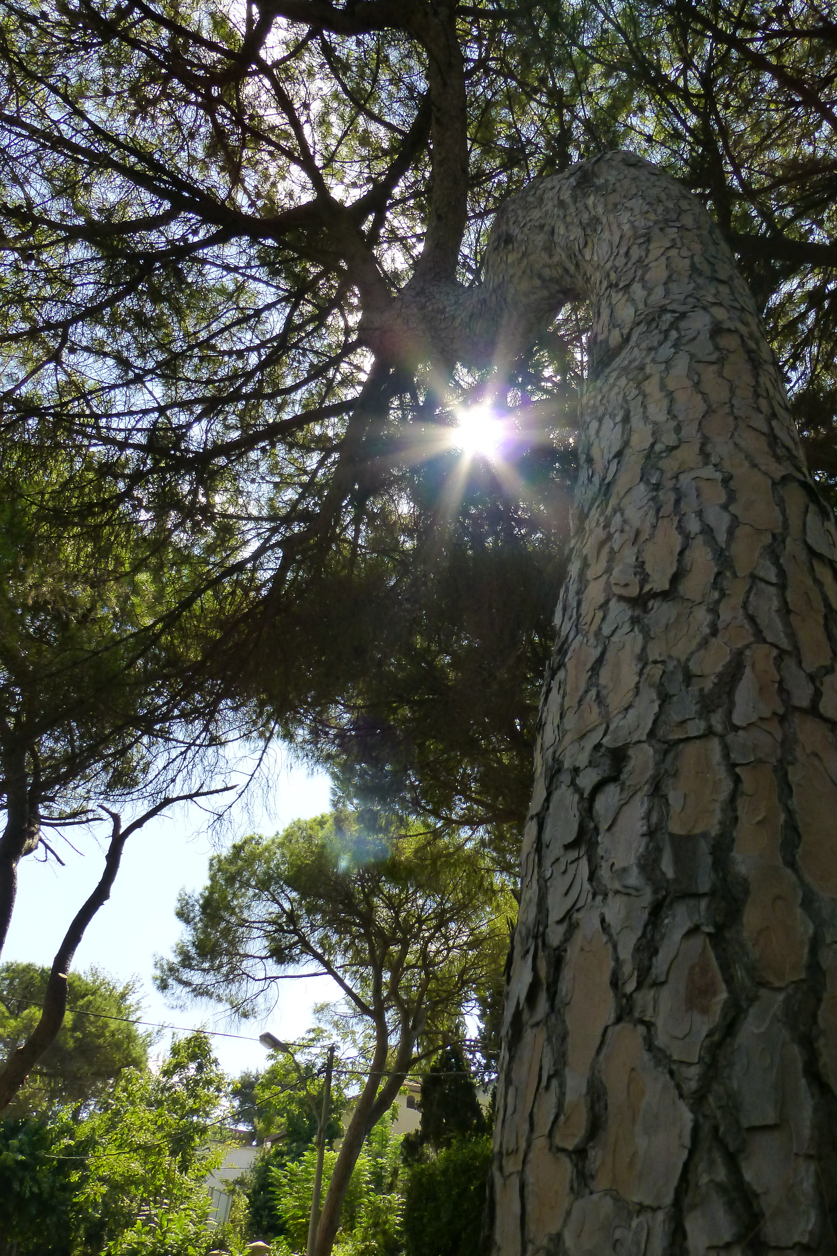 מרכז הכרמל, חיפה קרני השמש בוקעות מבעד לענפי העץ - מבט מלמטע